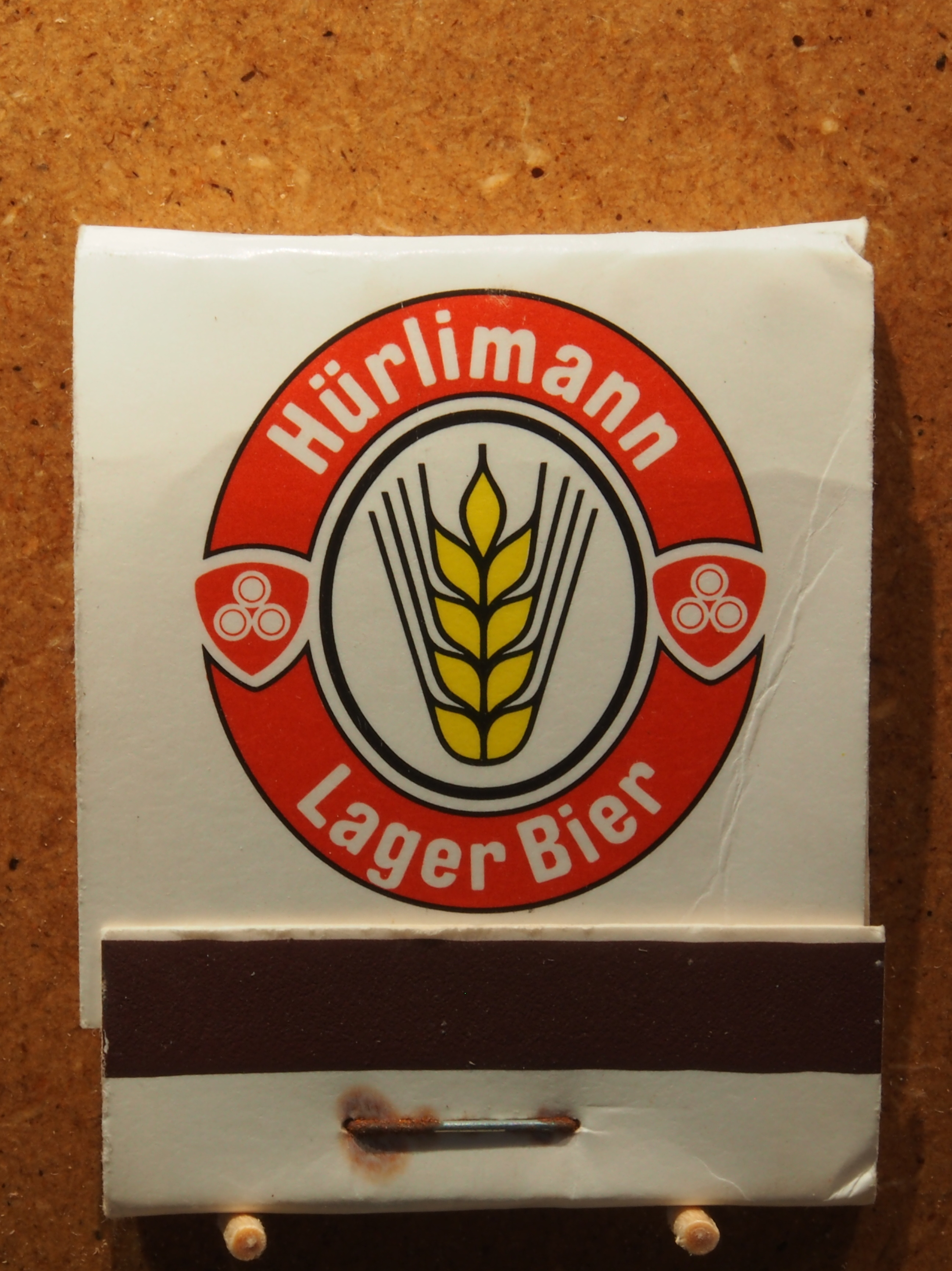 Matchbook - Hürlimann Lager Bier.